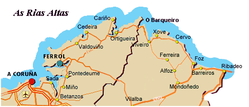 Mapa das Rias Altas. Galicia Publish by=